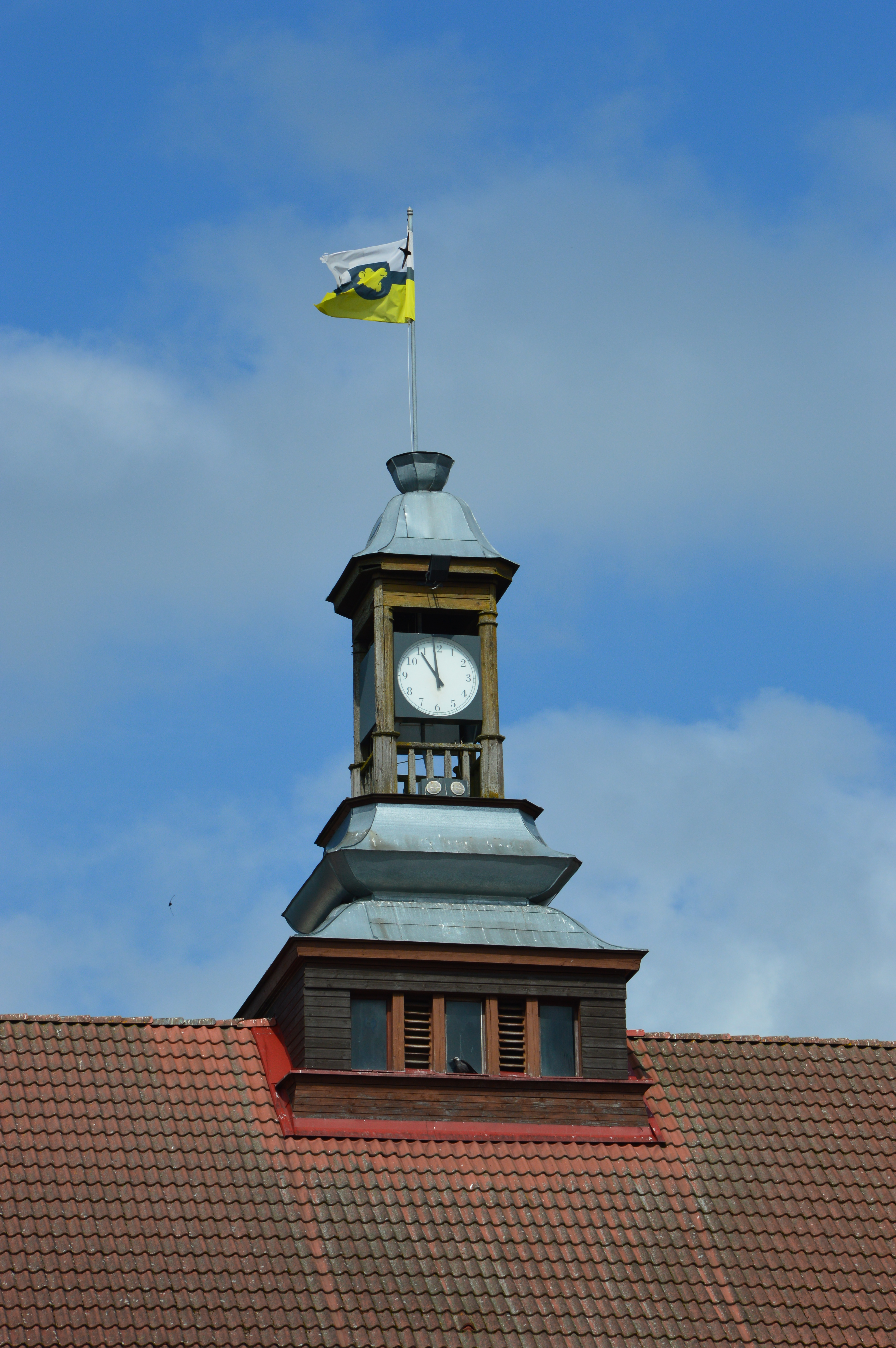 Otepää linnavalitsuse hoone